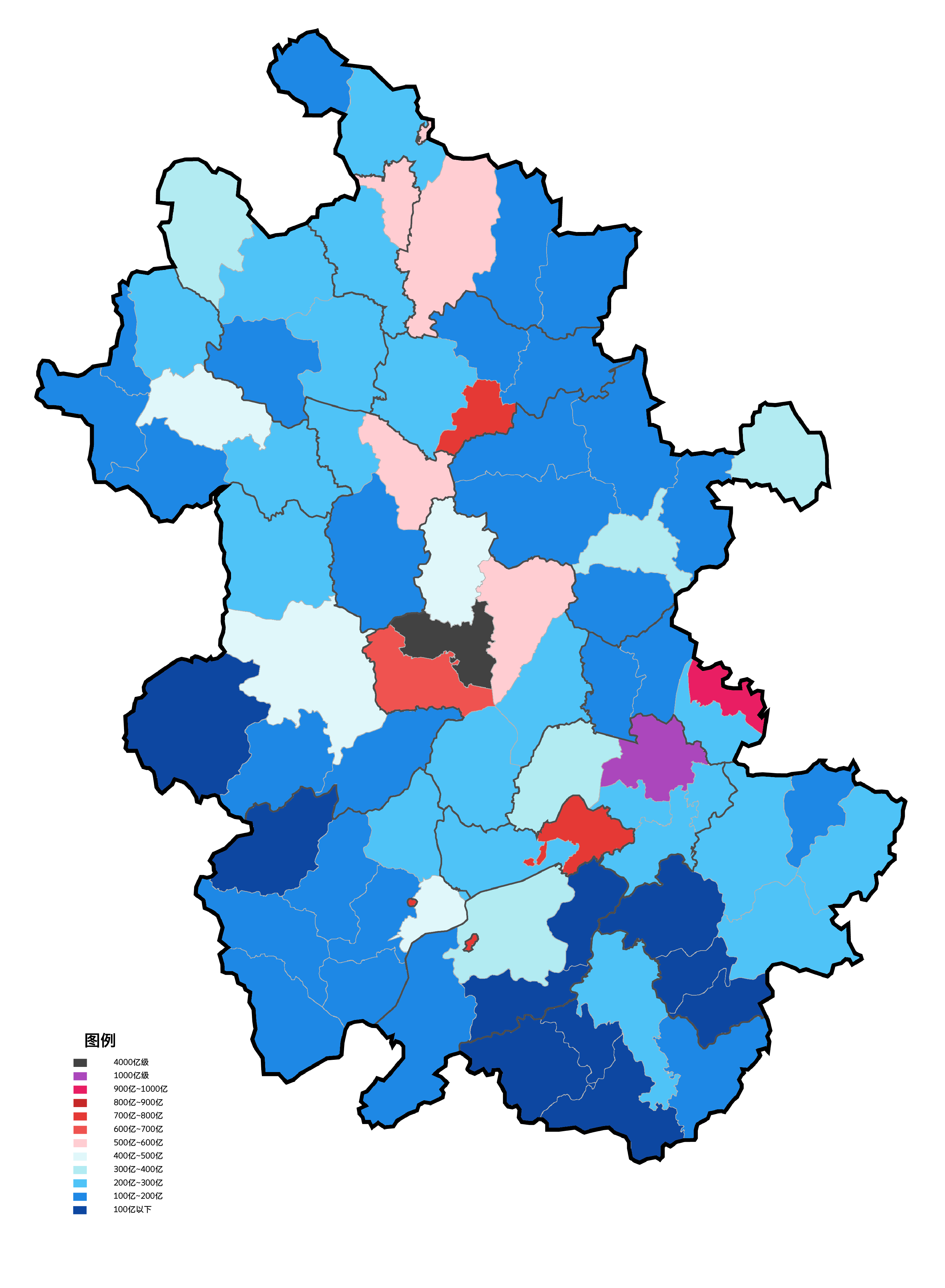 安徽省县市根据2016年地区生产总值填色地图